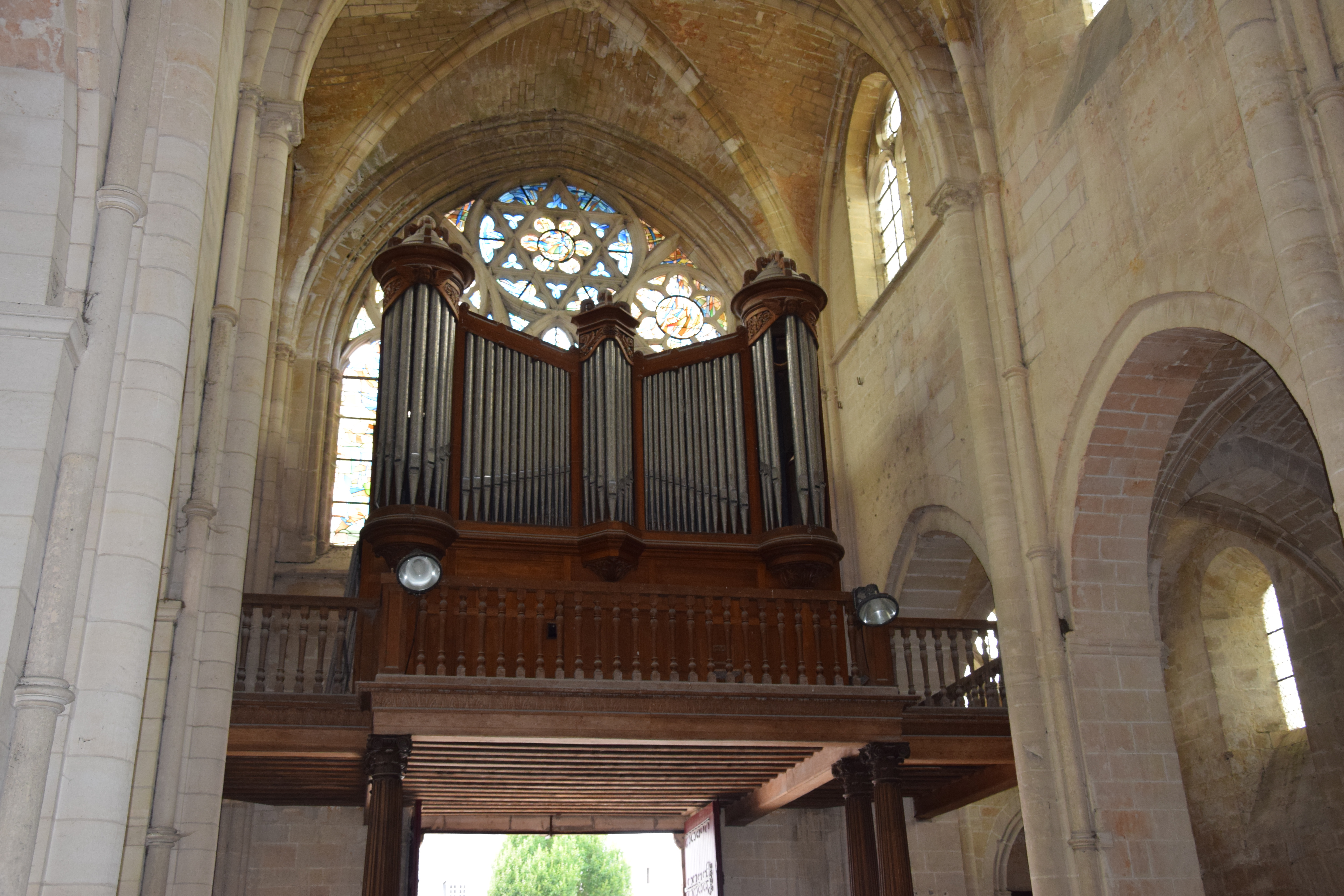 Église Saint-Martin (Laon) .